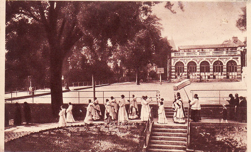 Carte postale ancienne : procession à l'école missionnaire franciscaine de Fontenay-sous-Bois.